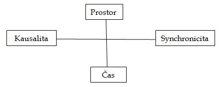 Schéma převzato z knihy Příroda a duše str.95